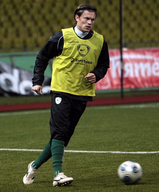 Zlatko Dedič